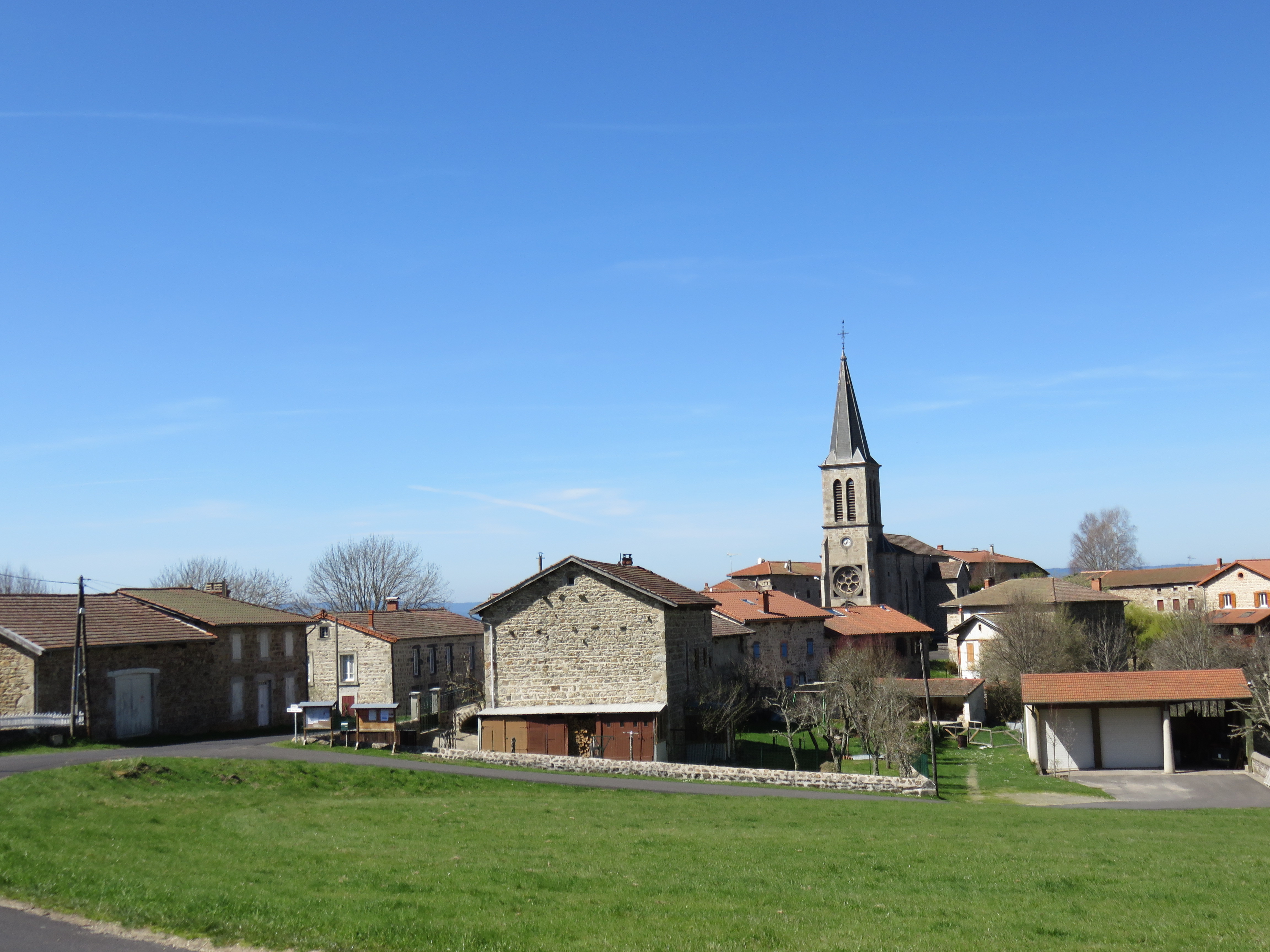 Vue de Baffie, dans le Puy-de-Dôme.